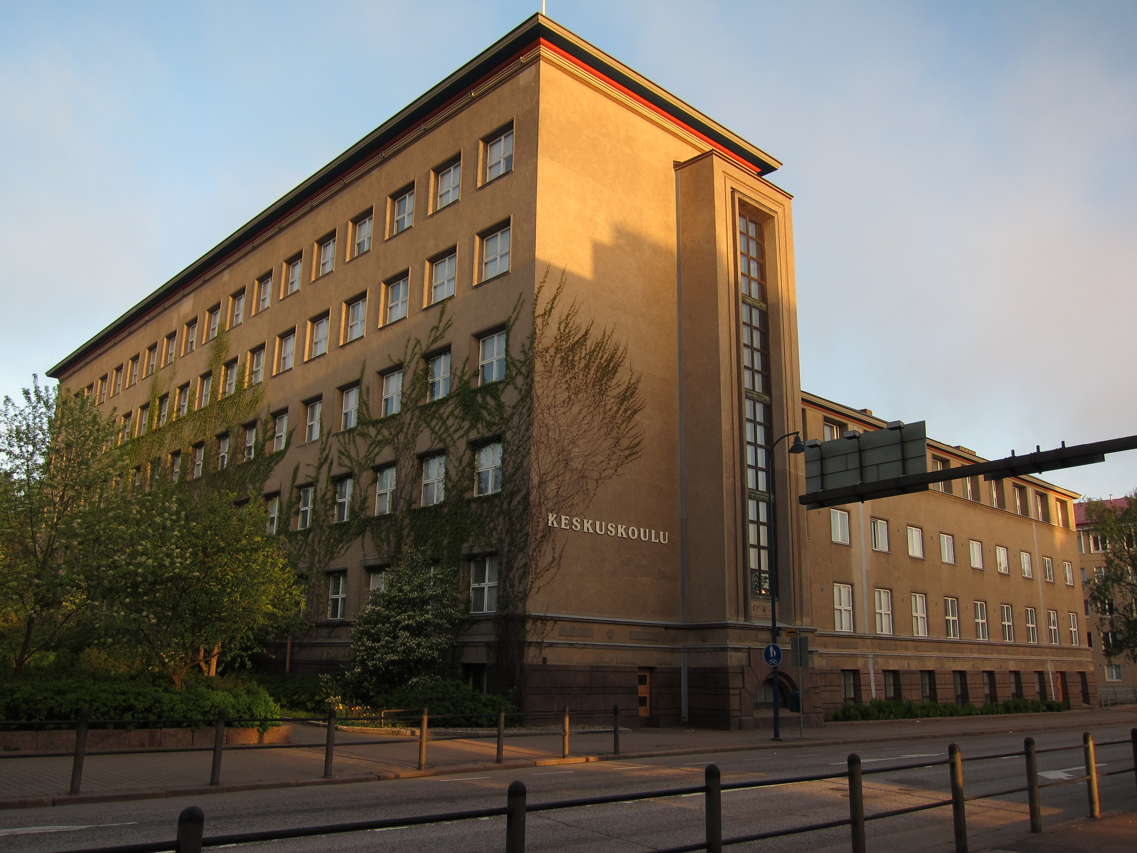 Kotkan keskuskoulu.